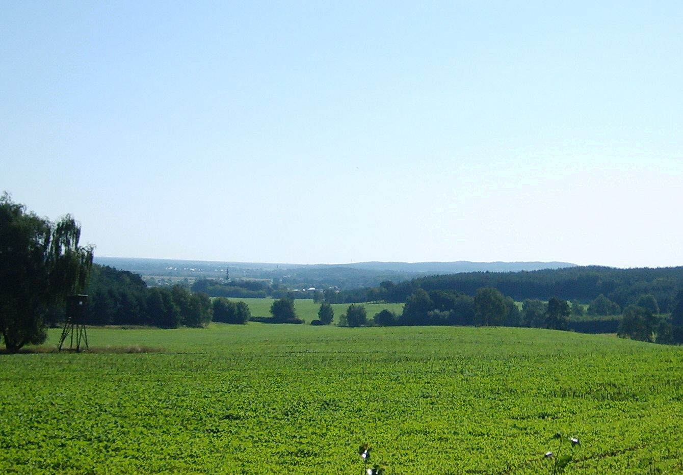 Hirschfeld aus Richtung Heidehöhe gesehen.